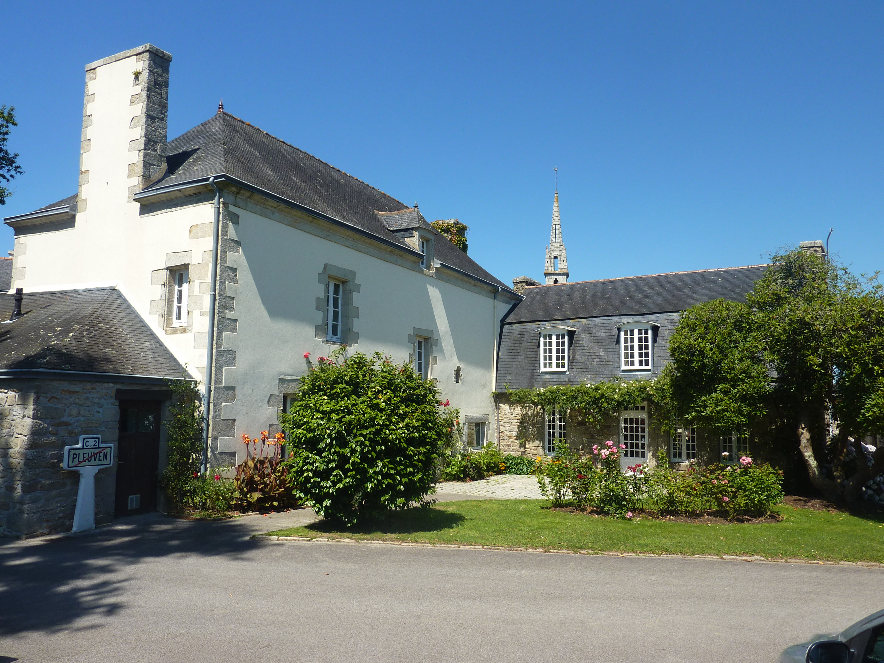 Pleuven : la mairie, façade arrière